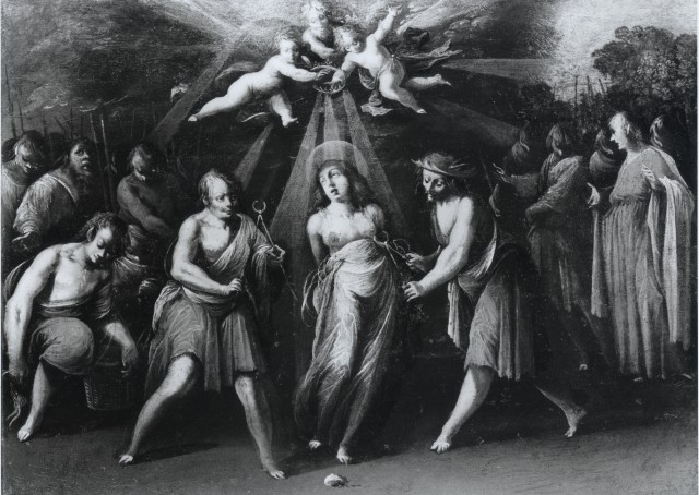 Martirio di sant'Agata, olio su tavola, 22 x 30.5 cm, coll. privata